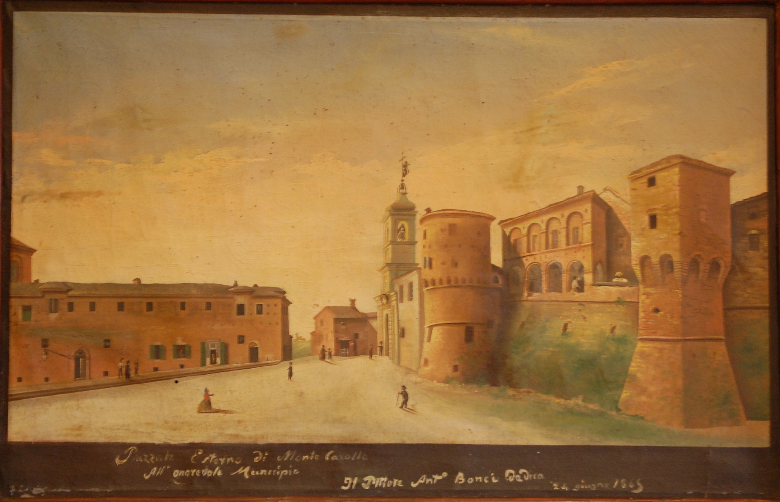 Montecarotto, veduta della piazza esterna del pittore Antonio Bocci nel 1865